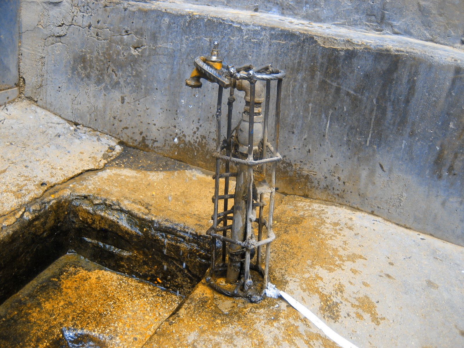 شیر آب در محوطه یک ترمینال